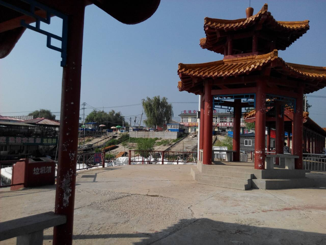 东平大安山